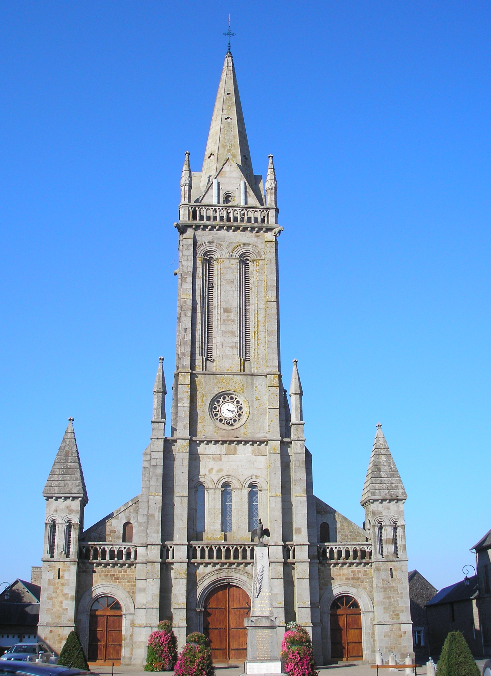 Le Teilleul (Normandie, France). L'église Saint-Patrice.